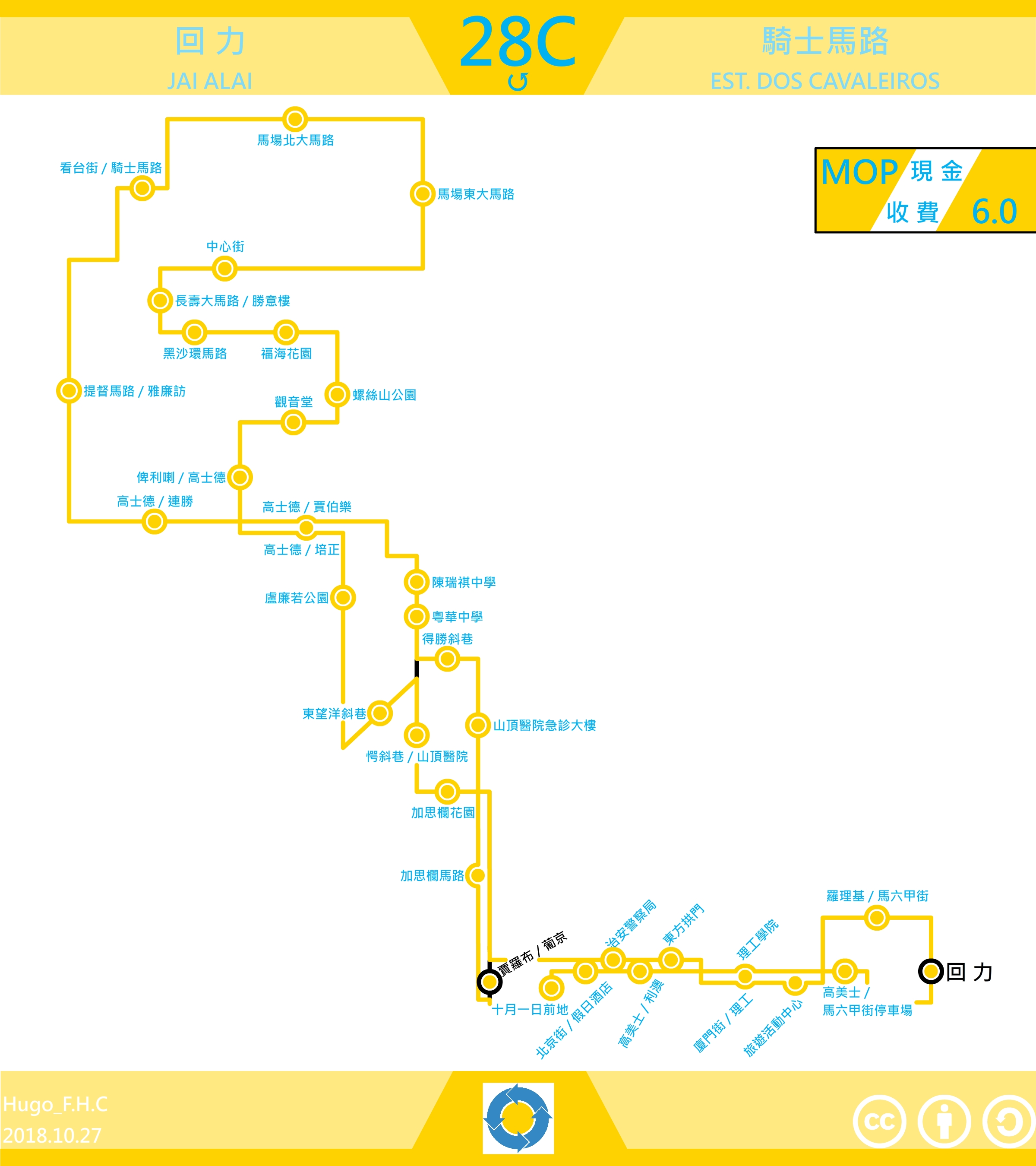 澳門巴士28C走線圖